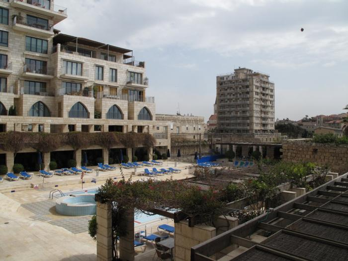 גבעת אנדרומדה היא שכונת מגורים סגורה ויוקרתית ברחוב לואי פסטר ורחוב יפת ביפו. השכונה נמצאת מעל נמל יפו, והכניסה אליה היא מרחוב יפת